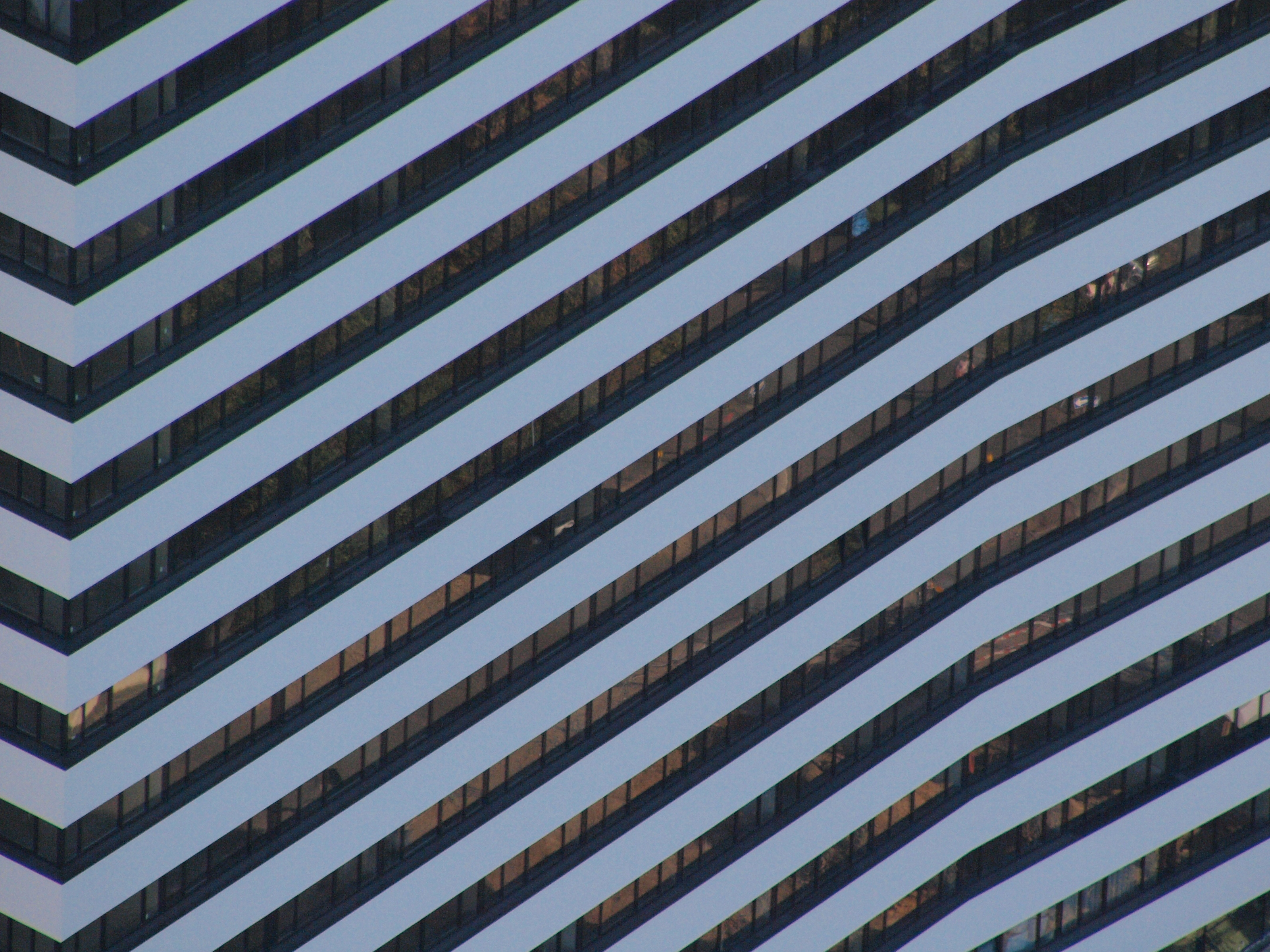 Geplanter Hotelbau (eröffnet 2016) des World Conference Center Bonn, Fassade